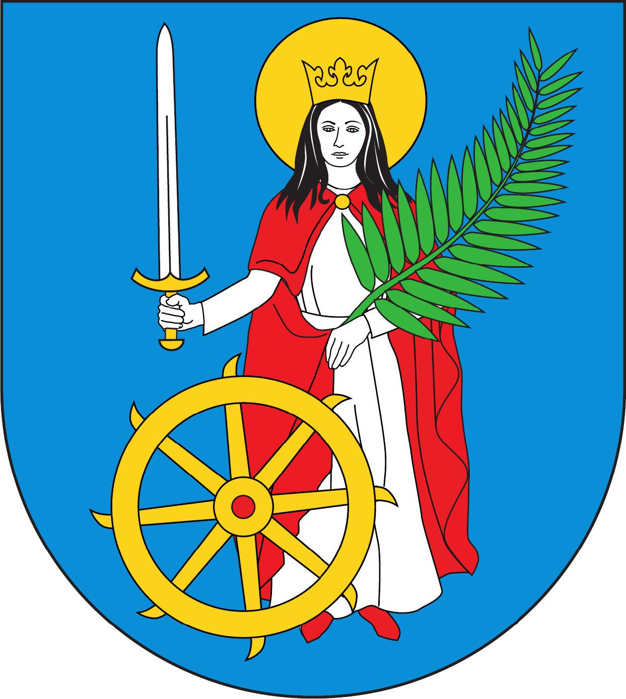 Herb gminy Olesno w województwie małopolskim.